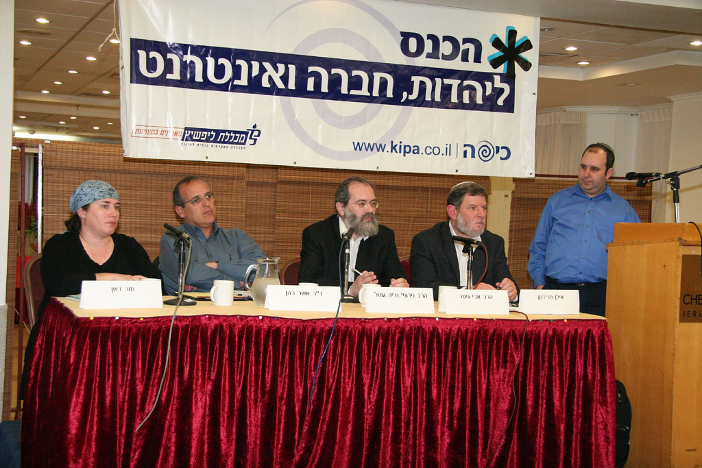 אילן_פרידמן, הרב אבי גיסר, פרופ' נריה גוטל, ד"ר אשר כהן, מור דשן בכנס כיפה